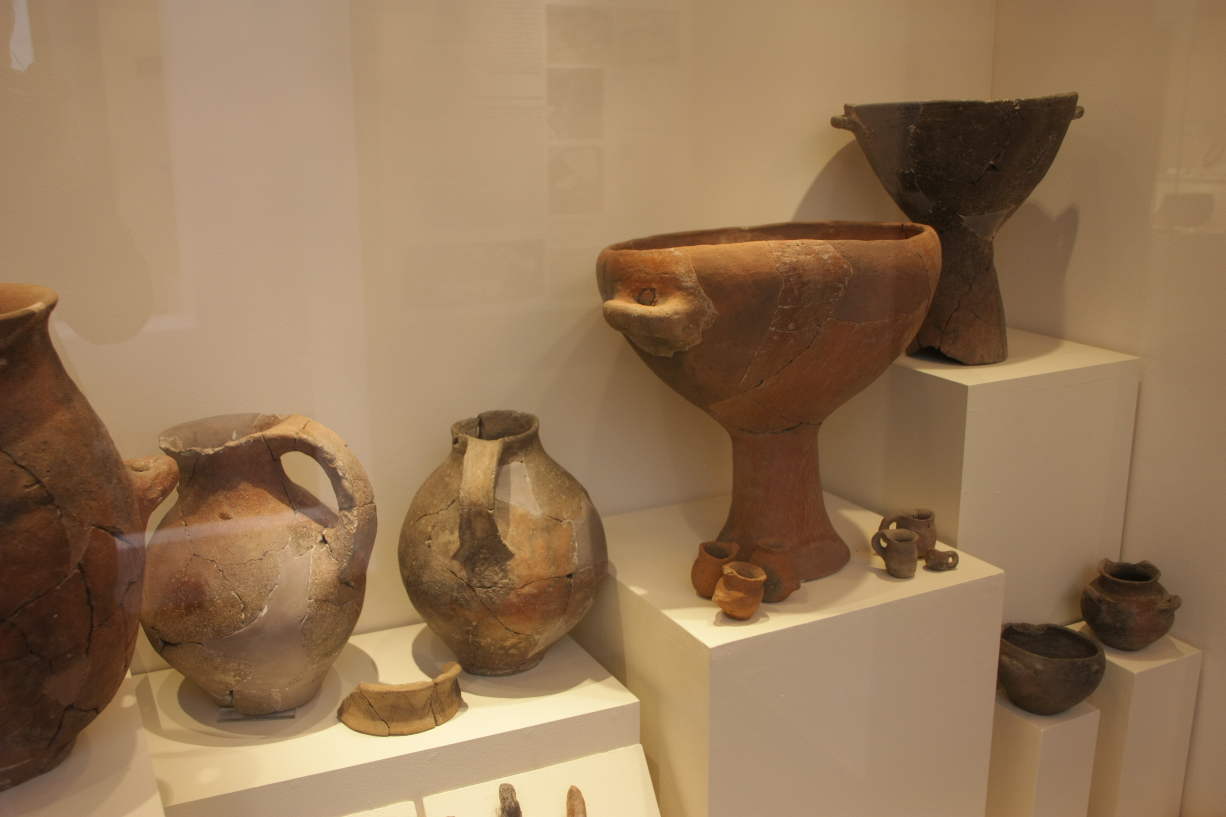 Età del bronzo medio 3 Cultura di Milazzese 1500-1300 a.C. Filicudi, montagnola di capo Graziano